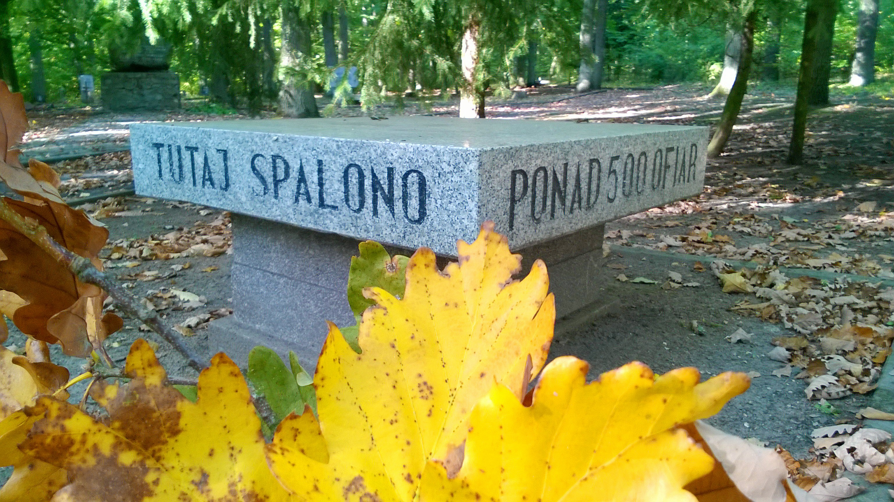 Cmentarza Ofiar Hitleryzmu w Toruniu1